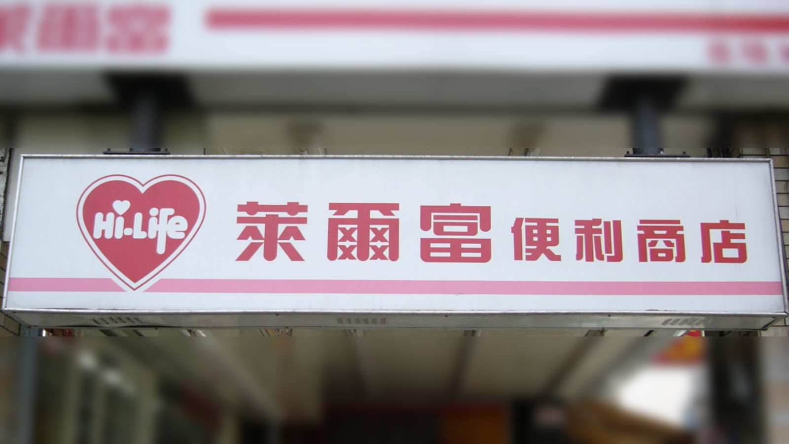 基隆市仁愛區精一路1號騎樓，萊爾富便利商店基隆旭隆店小型橫式招牌。